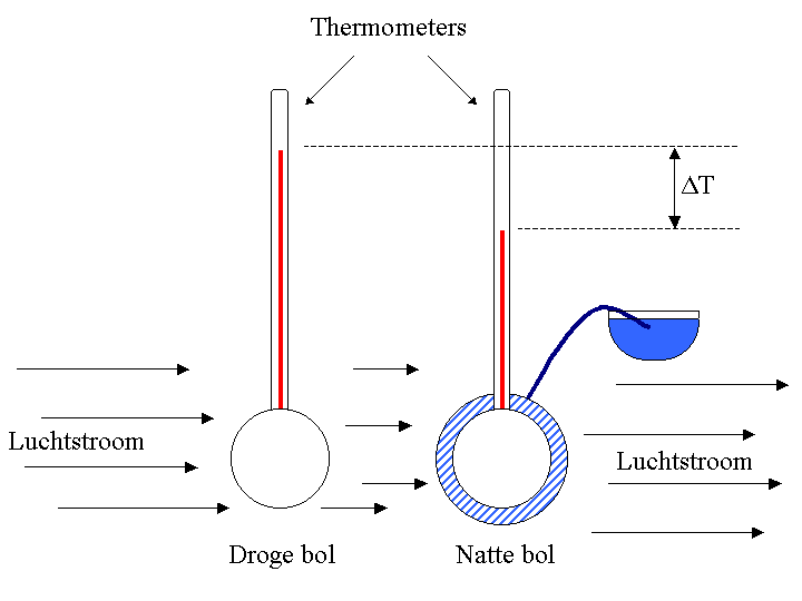 Natte-bol-temperatuur - eigen werk